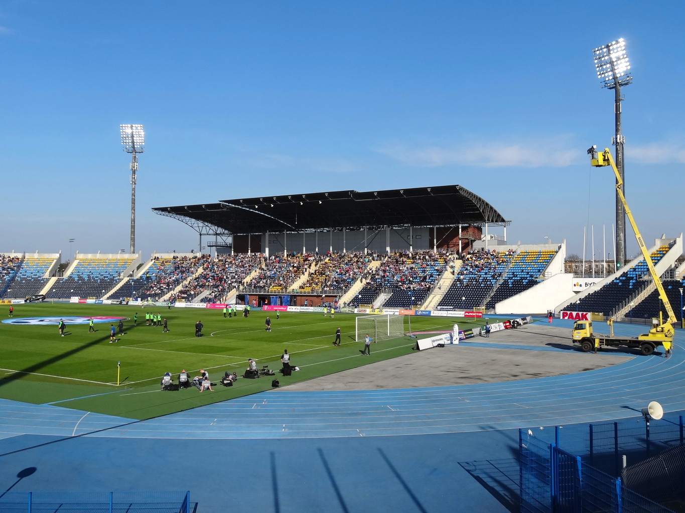 Stadion Zawiszy Bydgoszcz podczas przerwy w meczu ze Śląskiem Wrocław 30 marca 2014 roku